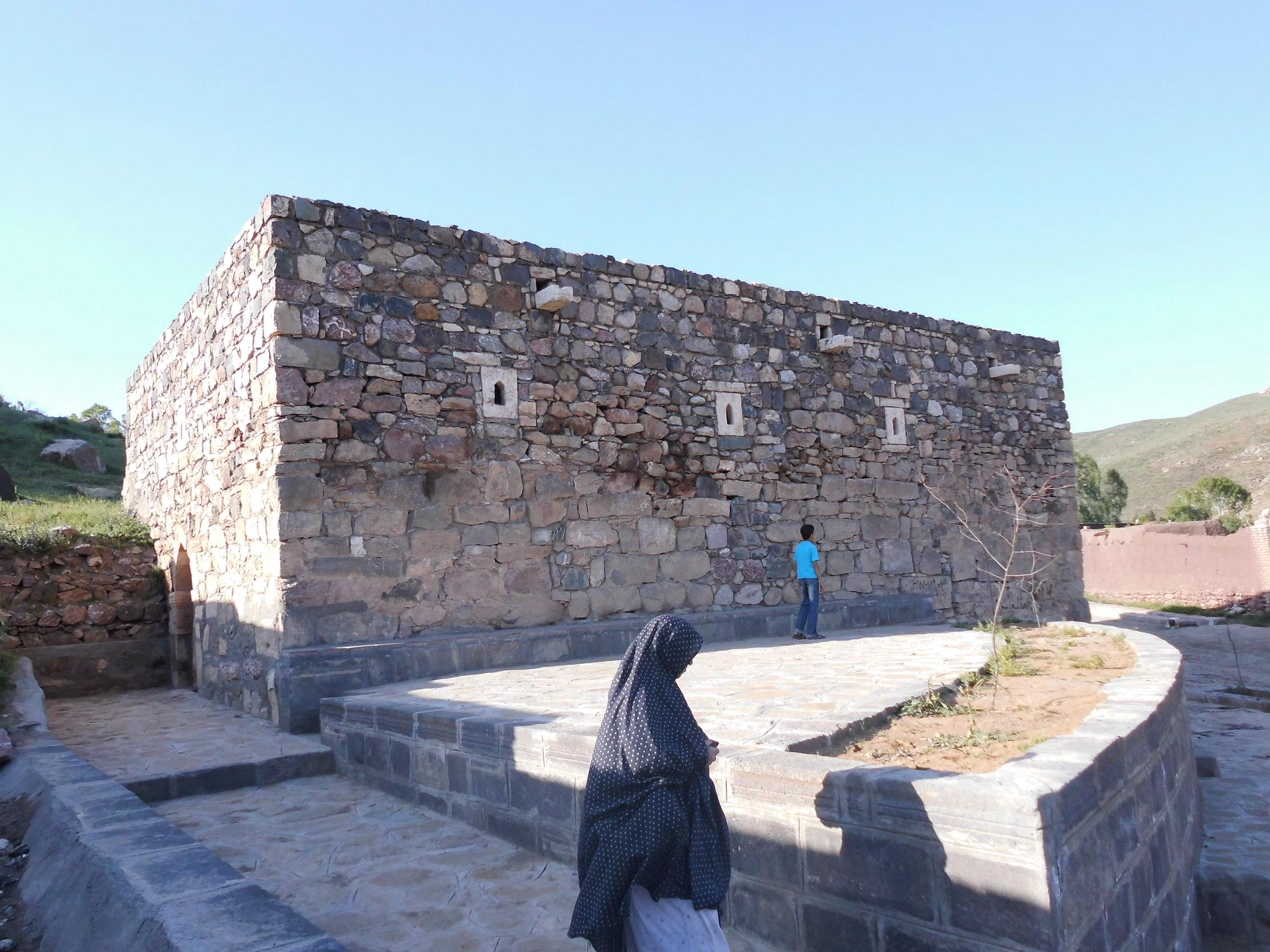 کلیسای قریس